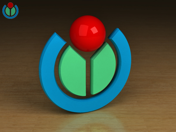 Wikimedia-Logo erstellt unter 3ds Max.